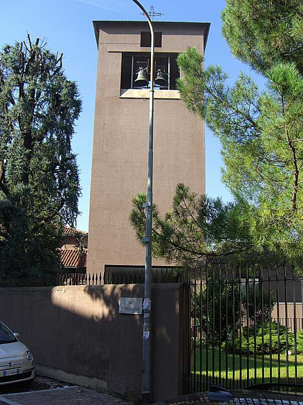 MB Monza il campanile della chiesa di San Biagio visto da via Torneamento